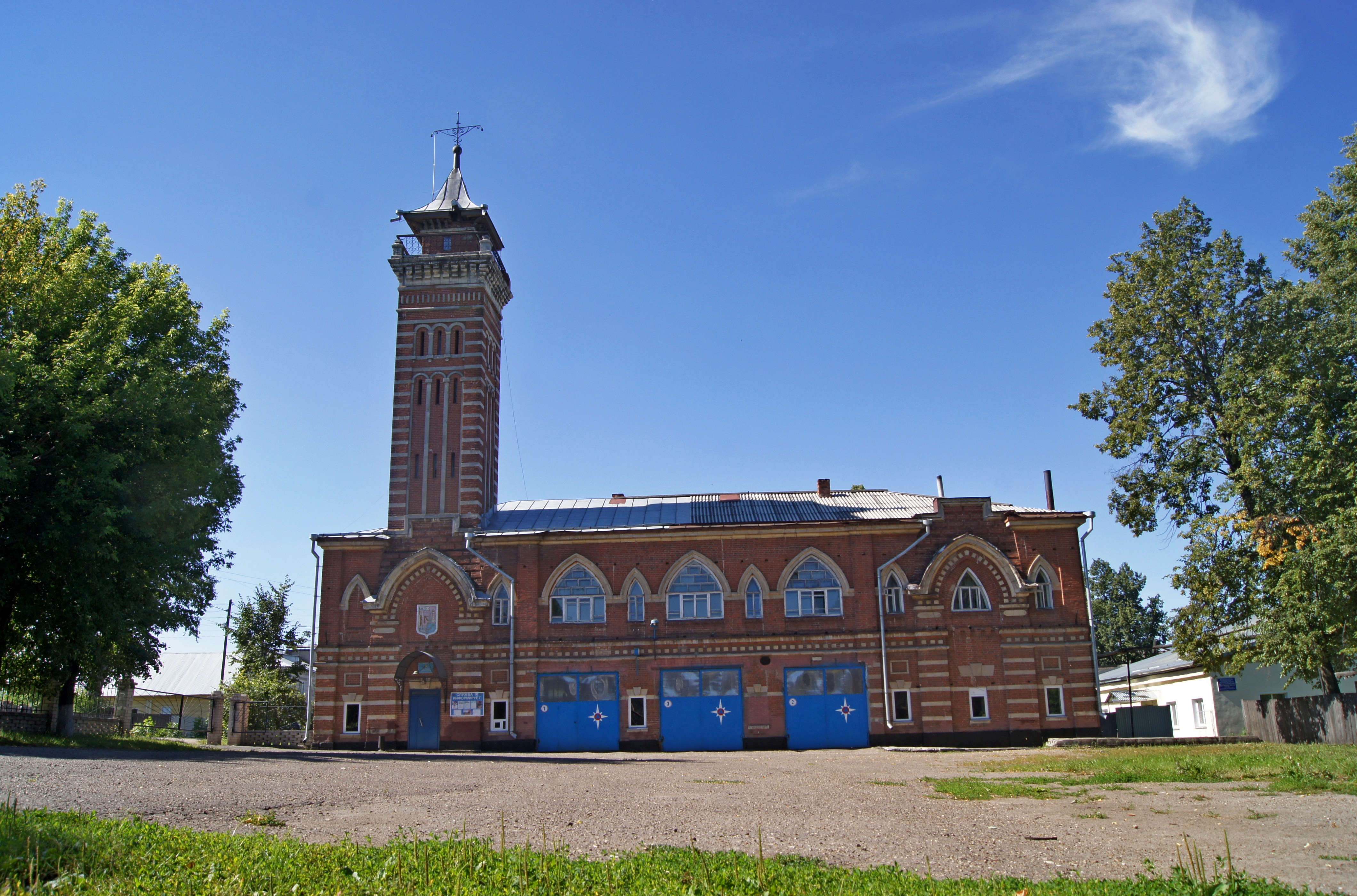 Здание пожарного депо с вышкой: улица Энгельса, 43, Советск, Советский район, Кировская область